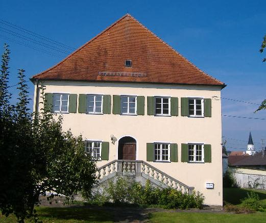 Donaumünster